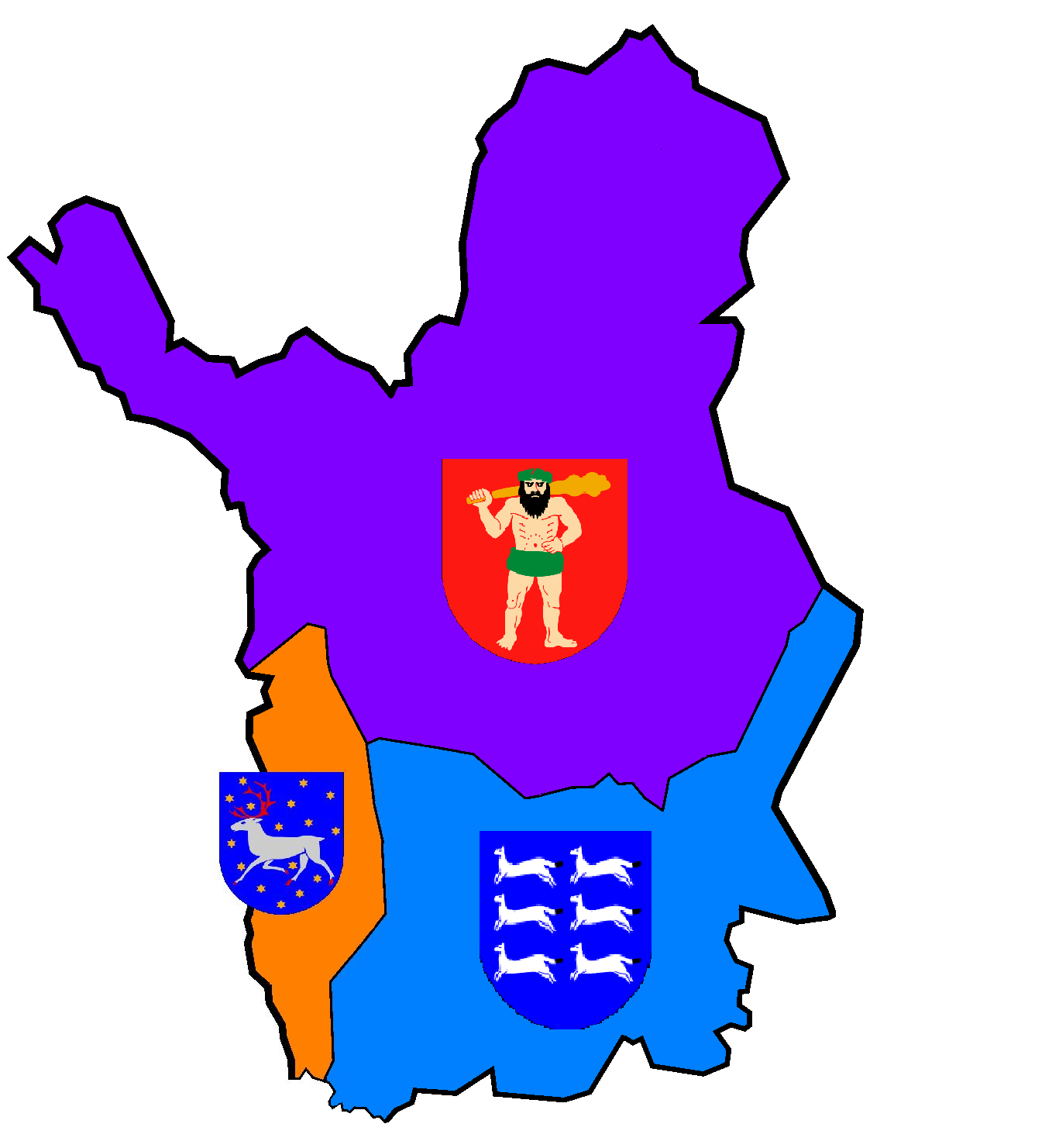 Lappi osatzen zuten hiru antzinako probintziak